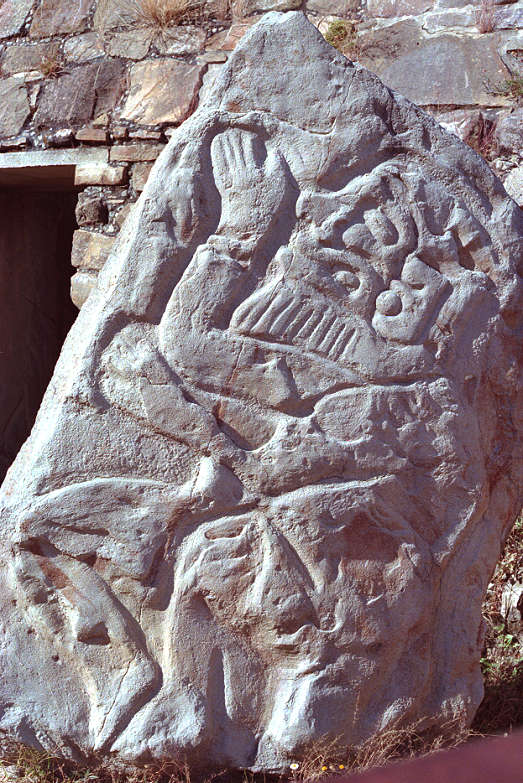 Danzantes Relief aus Monte Alban